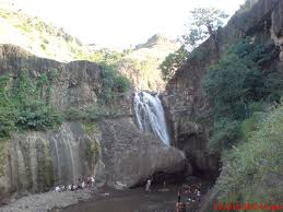 धुमाळवाडीचा धबधबा